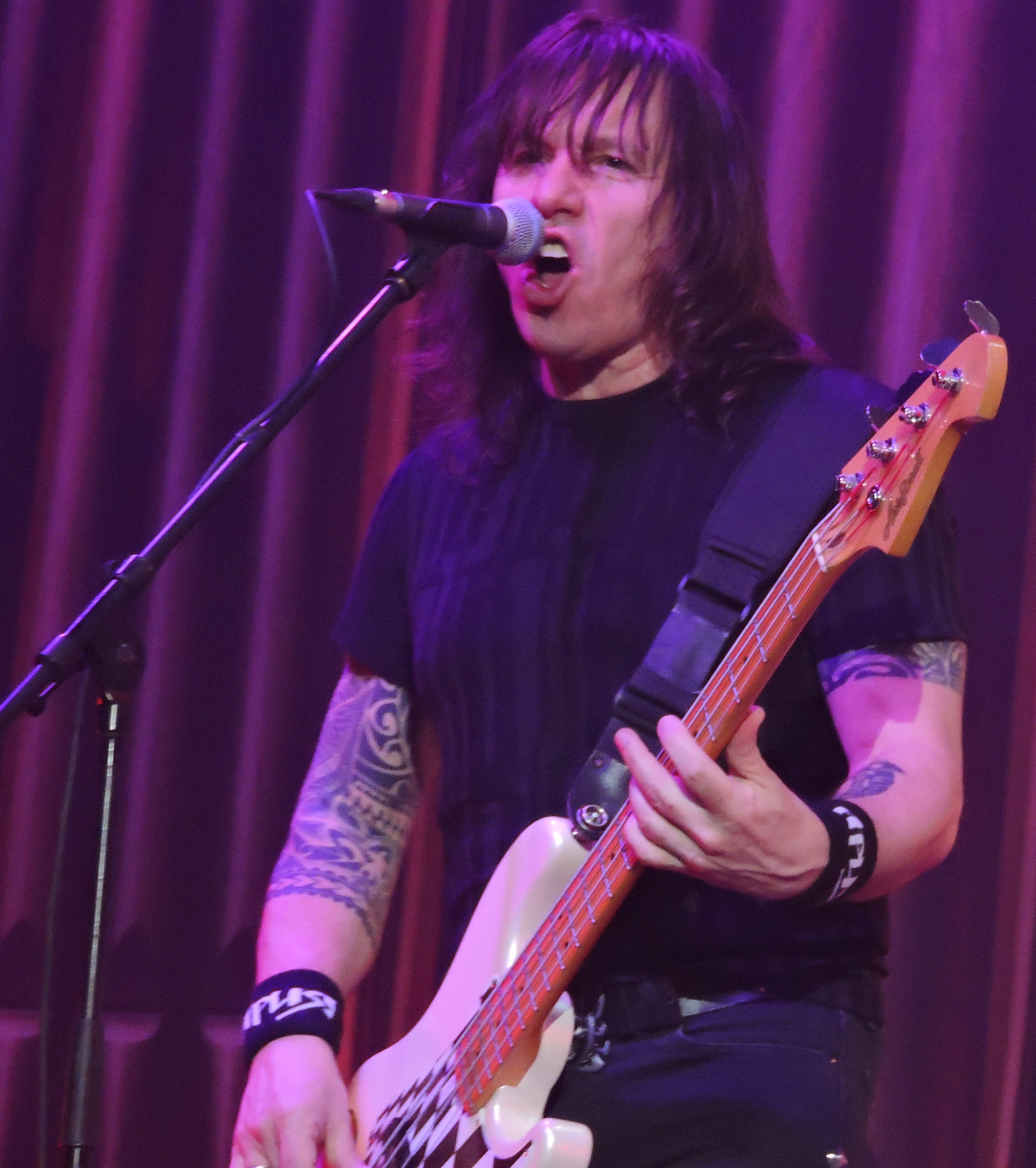 Виталий Дубинин (бас, подпевки)